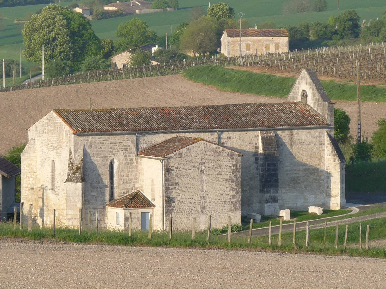 Eglise de Nonaville, Charente, France